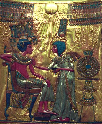 Detalle del trono de Tutankhamon